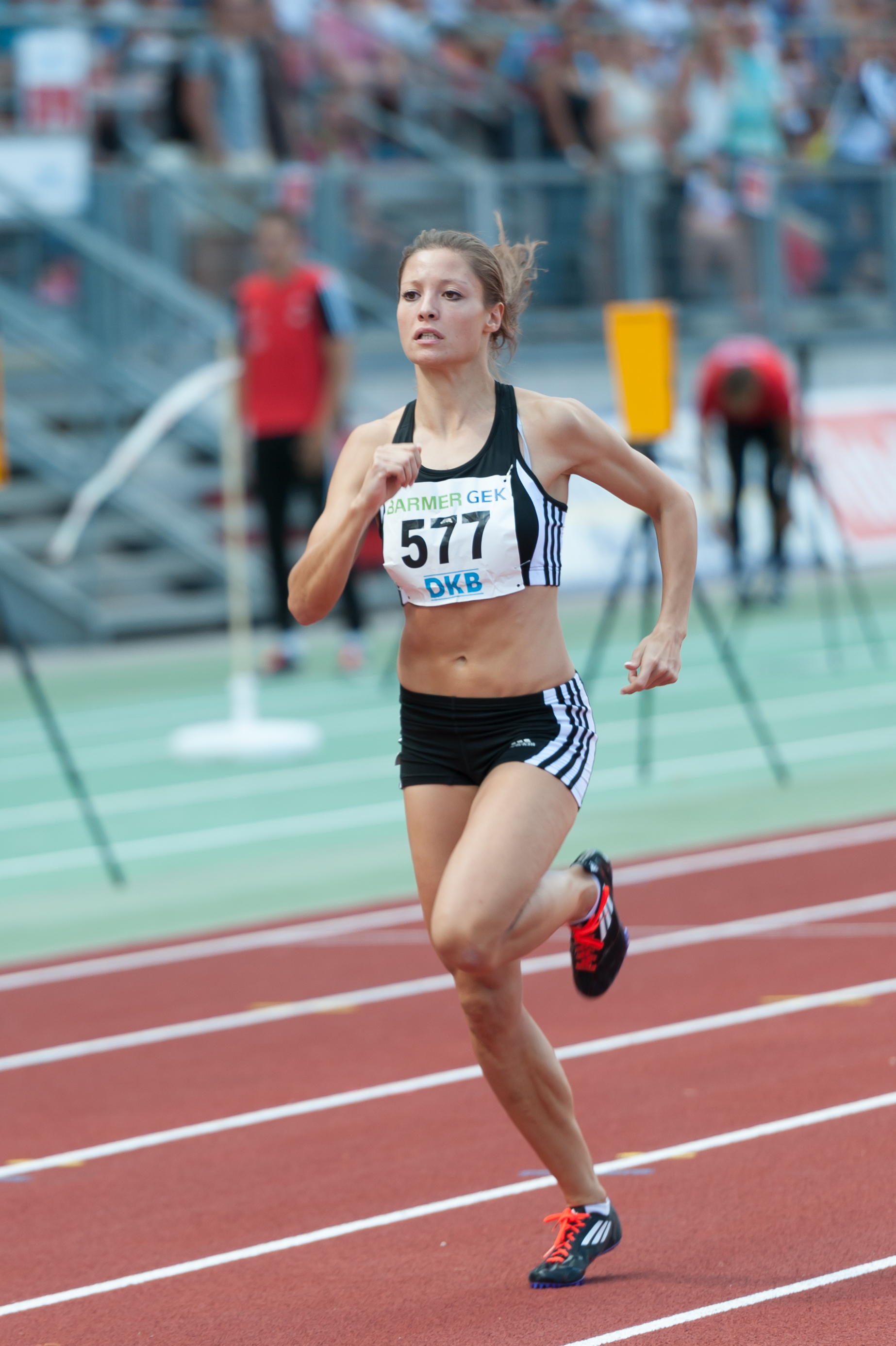 Deutsche Leichtathletik-Meisterschaften 2015: Frauen 400m - Ruth Sophia Spelmeyer, VFL Oldenburg